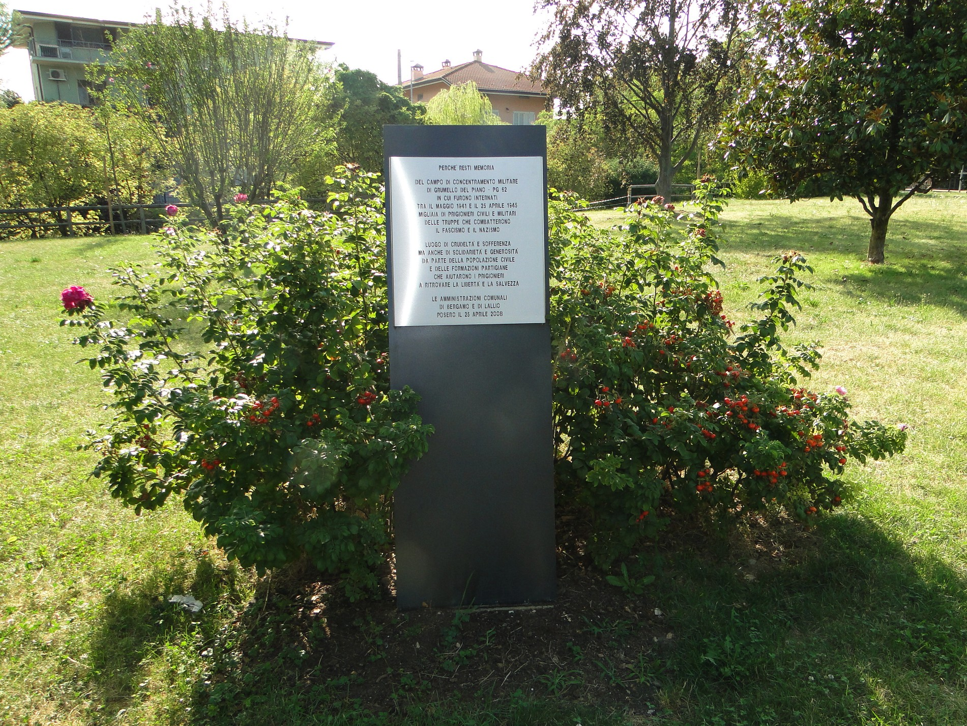 Parco a ricordo del campo di concentramento (seconda guerra mondiale) tra Grumello del Piano (Bergamo) e Lallio